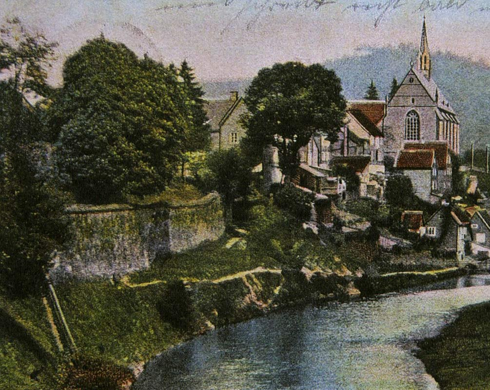 Beyenburg von Westen (Postkarte 1904) ru: Байенбург, видж с запада (на переднем плане остаток стены замка, с почтовой карточки 1904 года